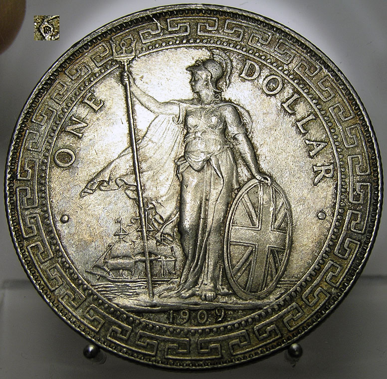 Vorderseite des Britischen Handelsdollar (1909/8B)